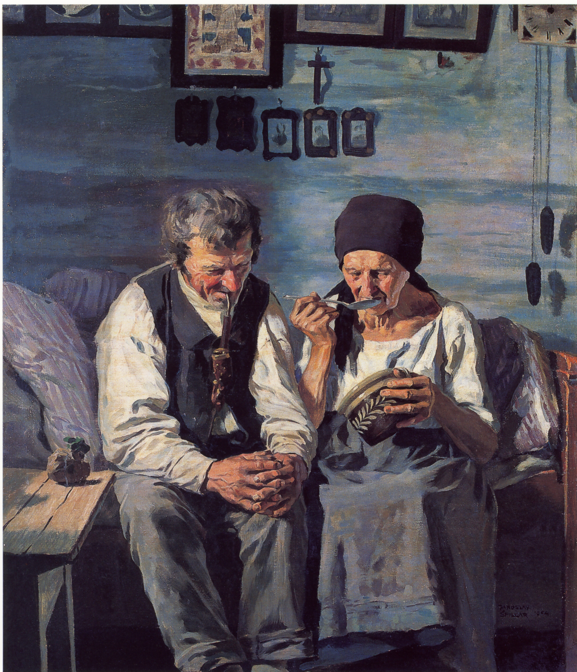 Jaroslav Spillar, Das Altenteil